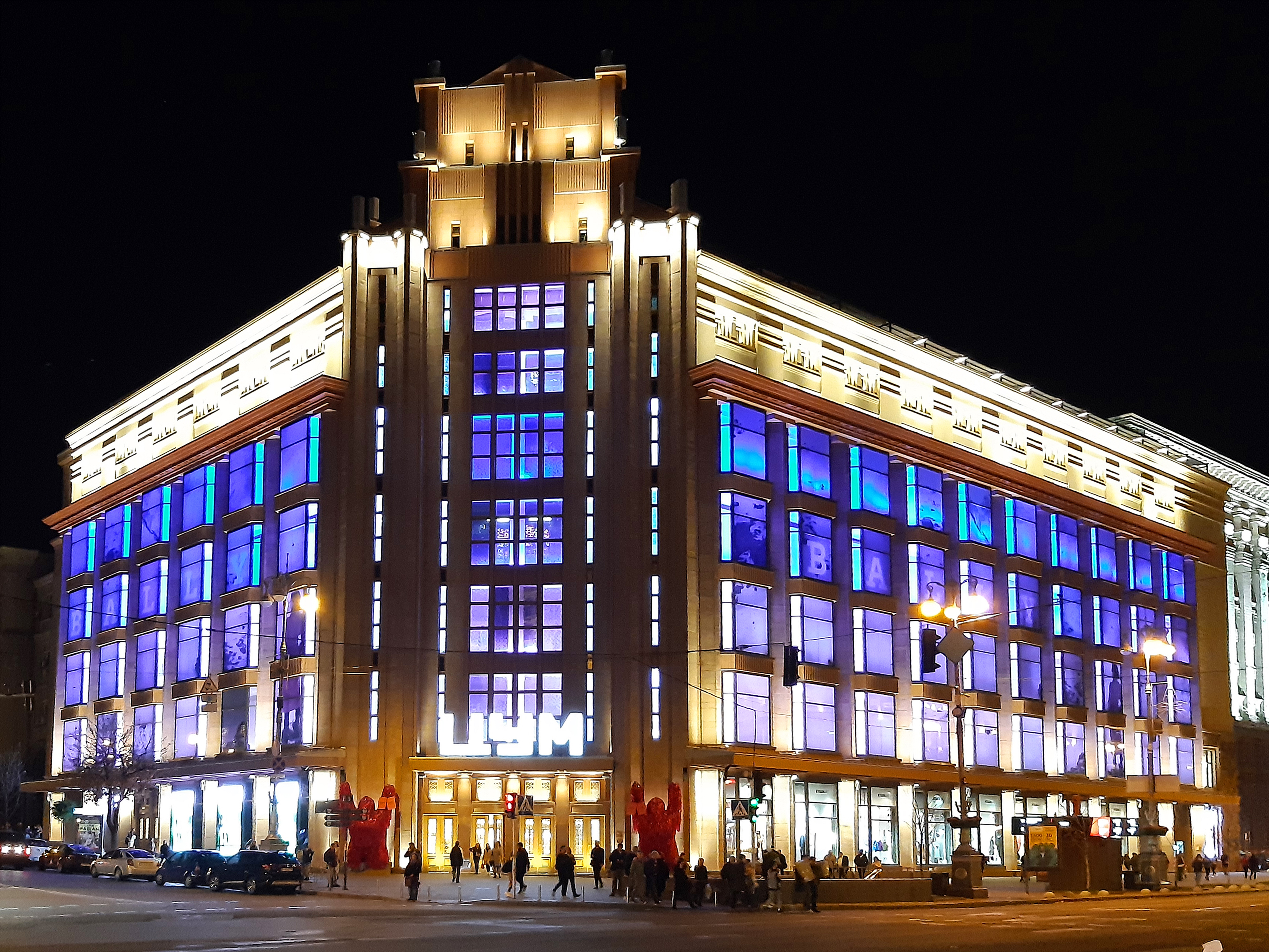 Центральний універмаг, Київ, вул. Хрещатик, 38/2